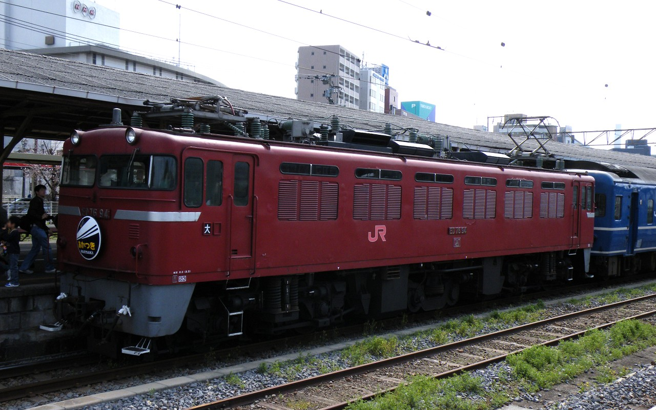 JR九州ED76形電気機関車94号機（「リバイバルあかつき」牽引）：長崎駅構内で撮影